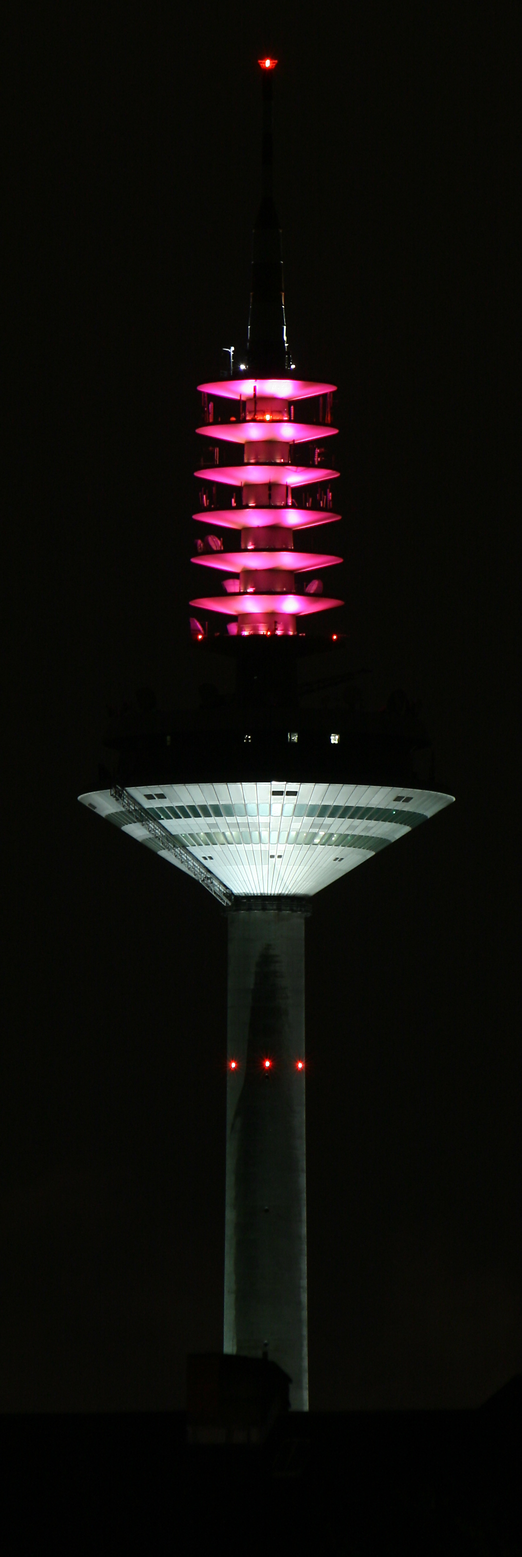 der Europaturm bei Nacht